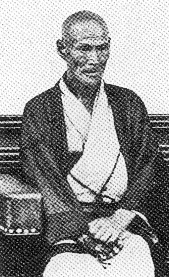 左官職人・入江長八の肖像写真。